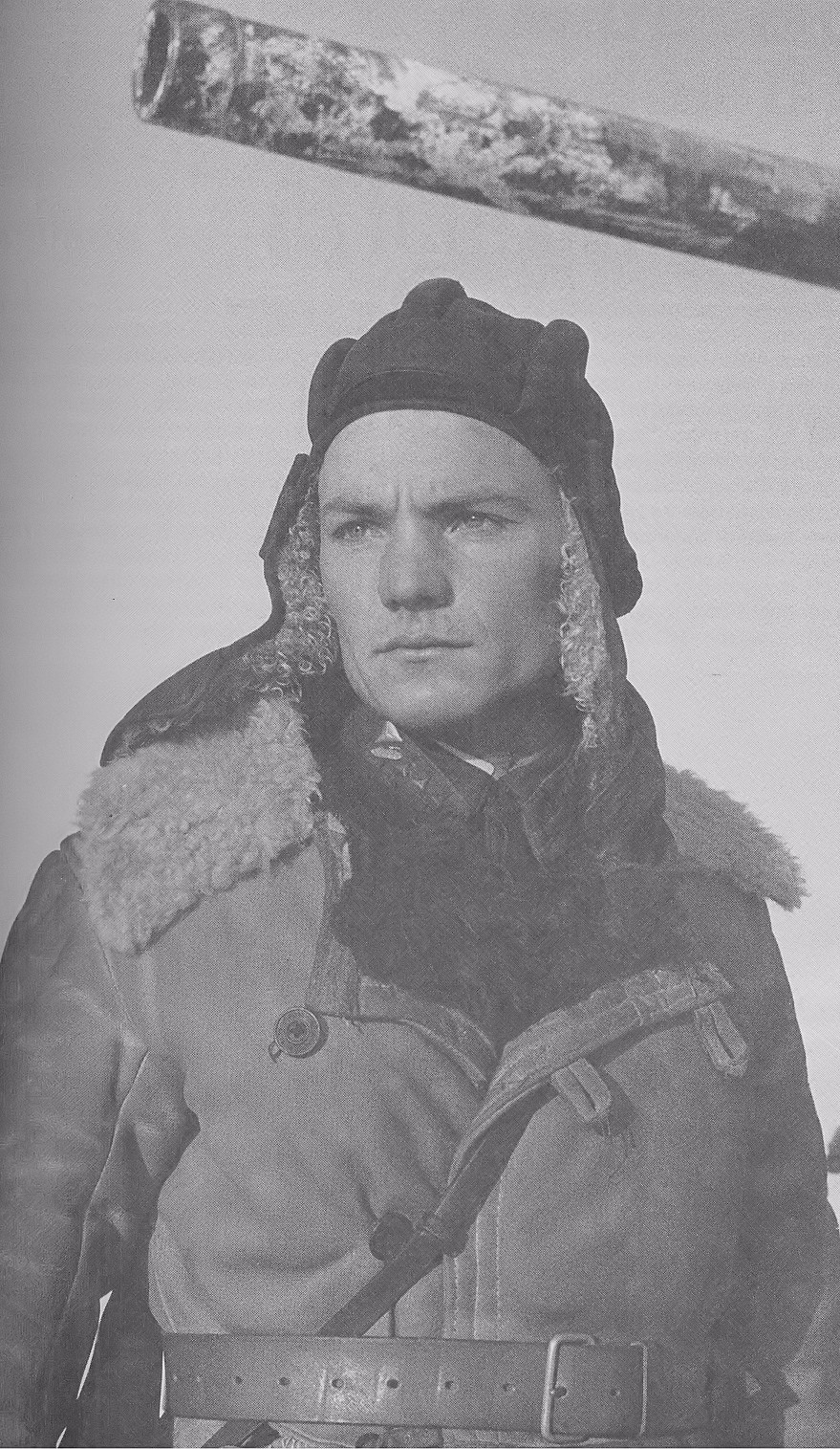 Герой Советского Союза - Любушкин, Иван Тимофеевич